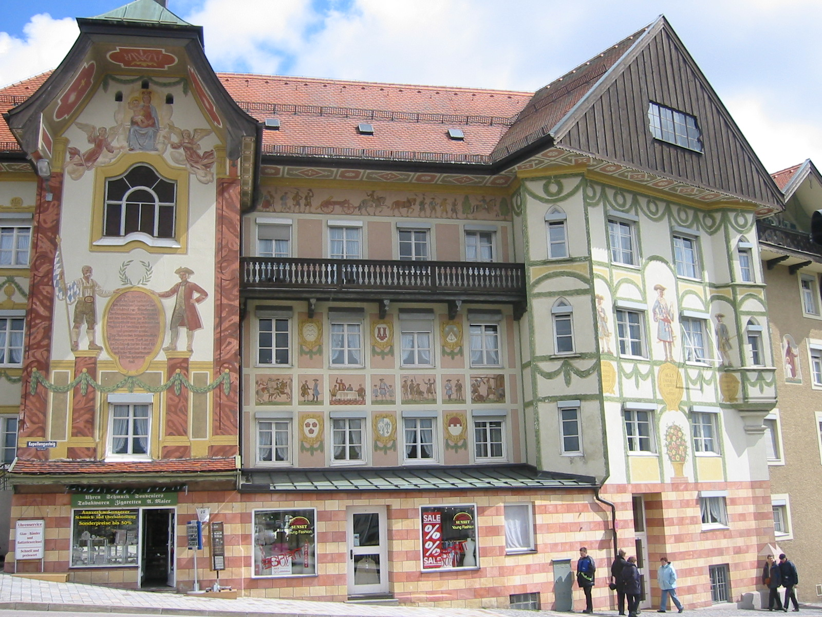 Marienstift in Bad Tölz, Architekt Gabriel von Seidl